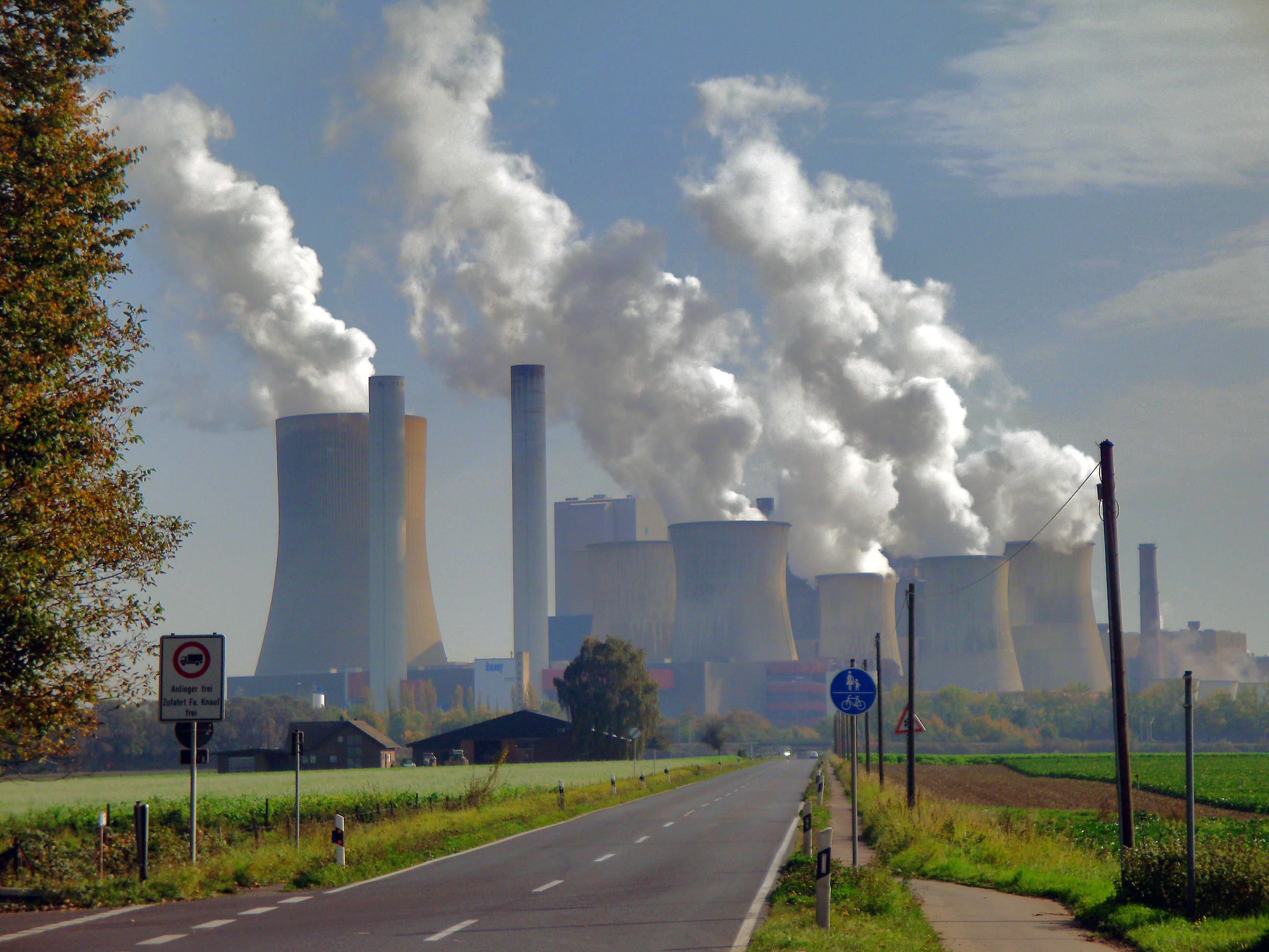 KW Niederaußem aus Nordwest